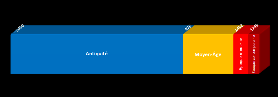 schéma de la chronologie de l'Histoire.